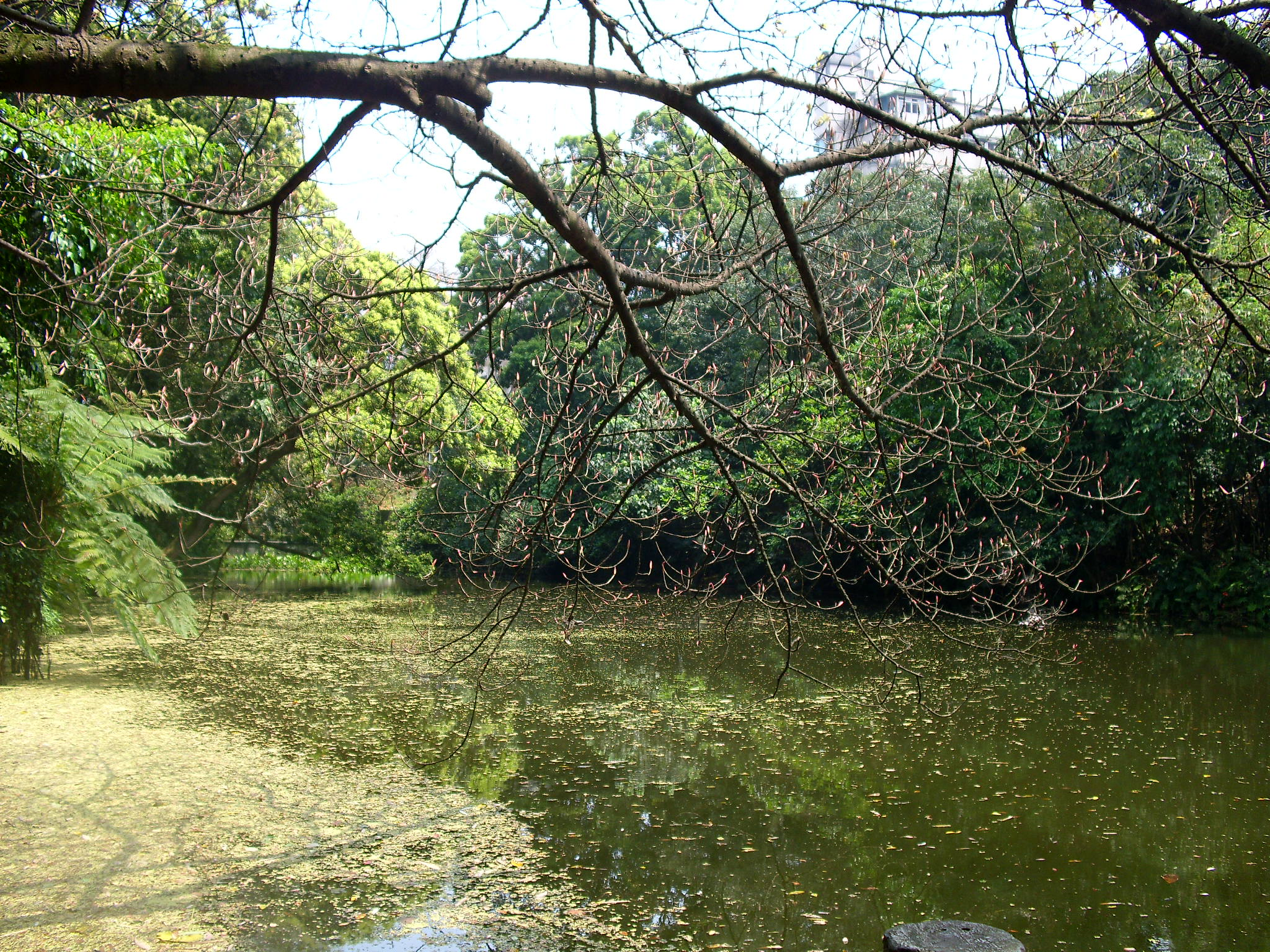 Bân-lâm-gú: 萃(tsuī)湖，佇臺北文山區的木柵公園內底，翕的時陣拄好樹仔開花落甲規个。